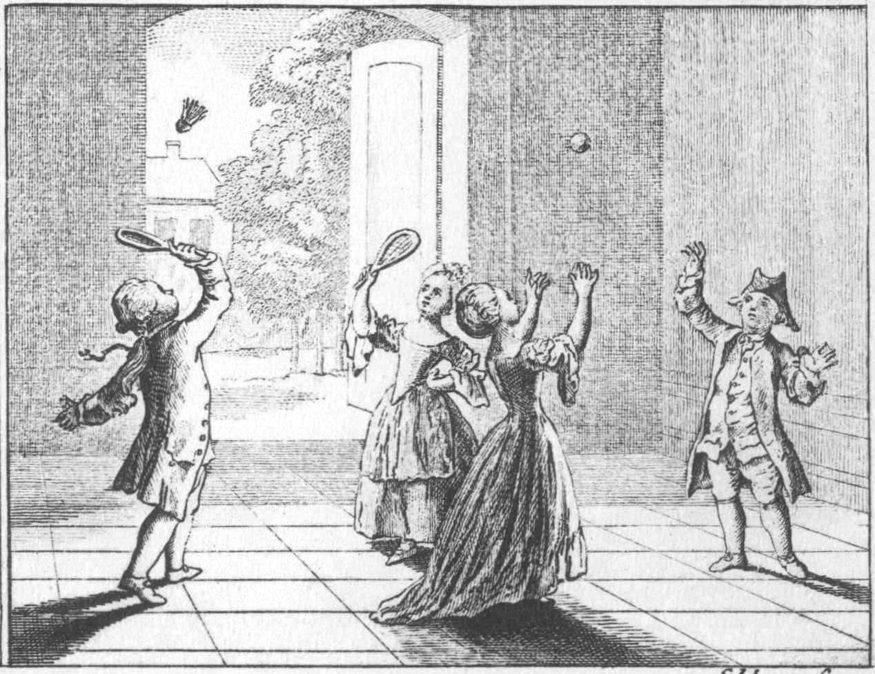 Andere Vergnügungen der Kinder. d) Der Ball und der Federball. (Beschreibung lt. Quelle)